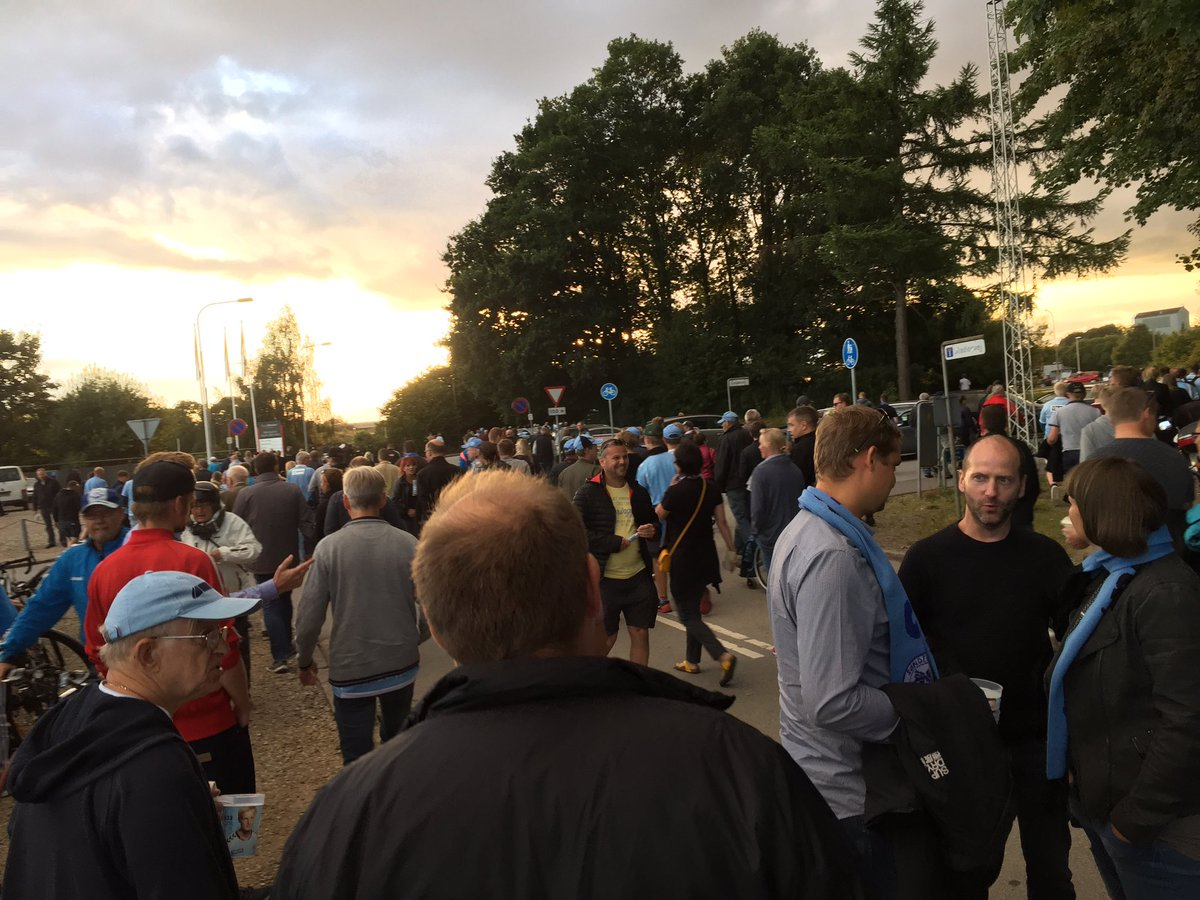 Trængsel for at komme væk fra Sydbank Park i Haderslev, efter Europa League kval kampen imod Sparta Prag den 18. august 2016.